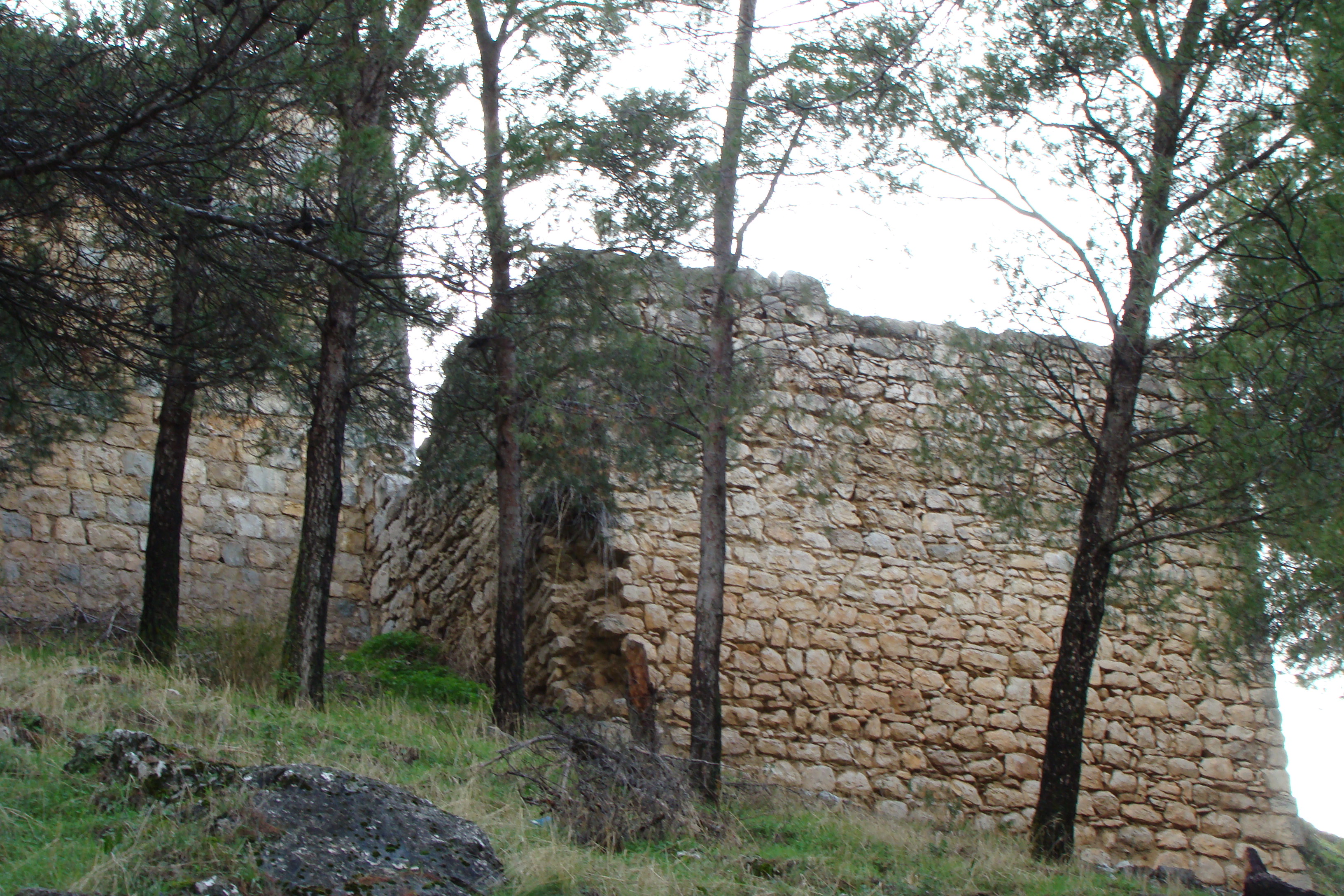 Restos de Torreones de la fortaleza del Abrahuí, en el Castillo de Jaén